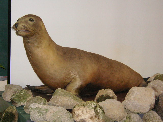 Japanese Sea Lion, stuffed specimen at Tennōji Zoo, Osaka, Japan. 天王寺動物園に保存されているニホンアシカの剥製（大阪市立天王寺動物園にて：2006年11月4日、本人撮影）